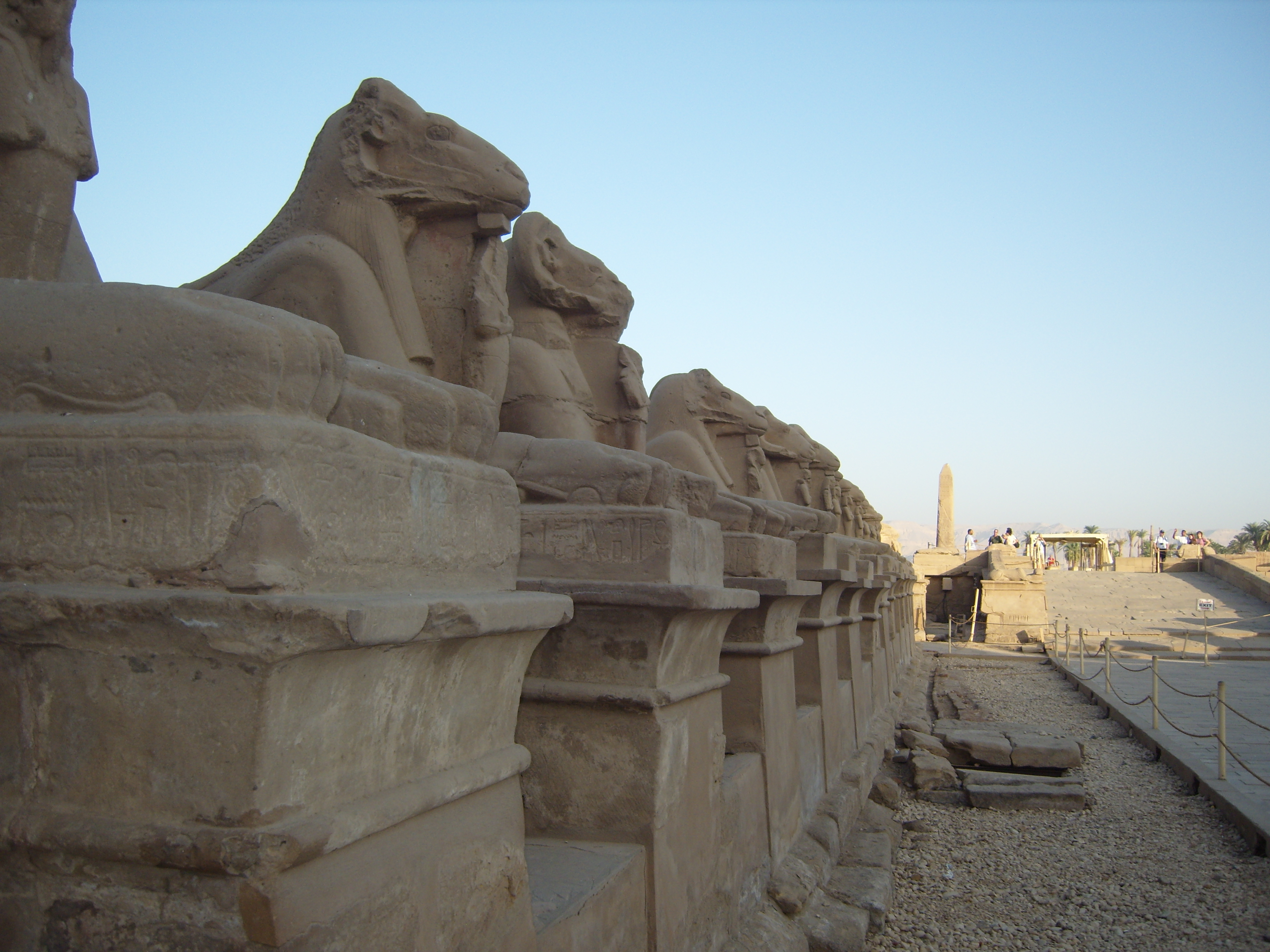 De zuidelijke rij sphynxen voor de eerste pylon, genomen vanaf de pylonzijde bij het tempelcomplex van Karnak License: CC-BY-SA && GFDL